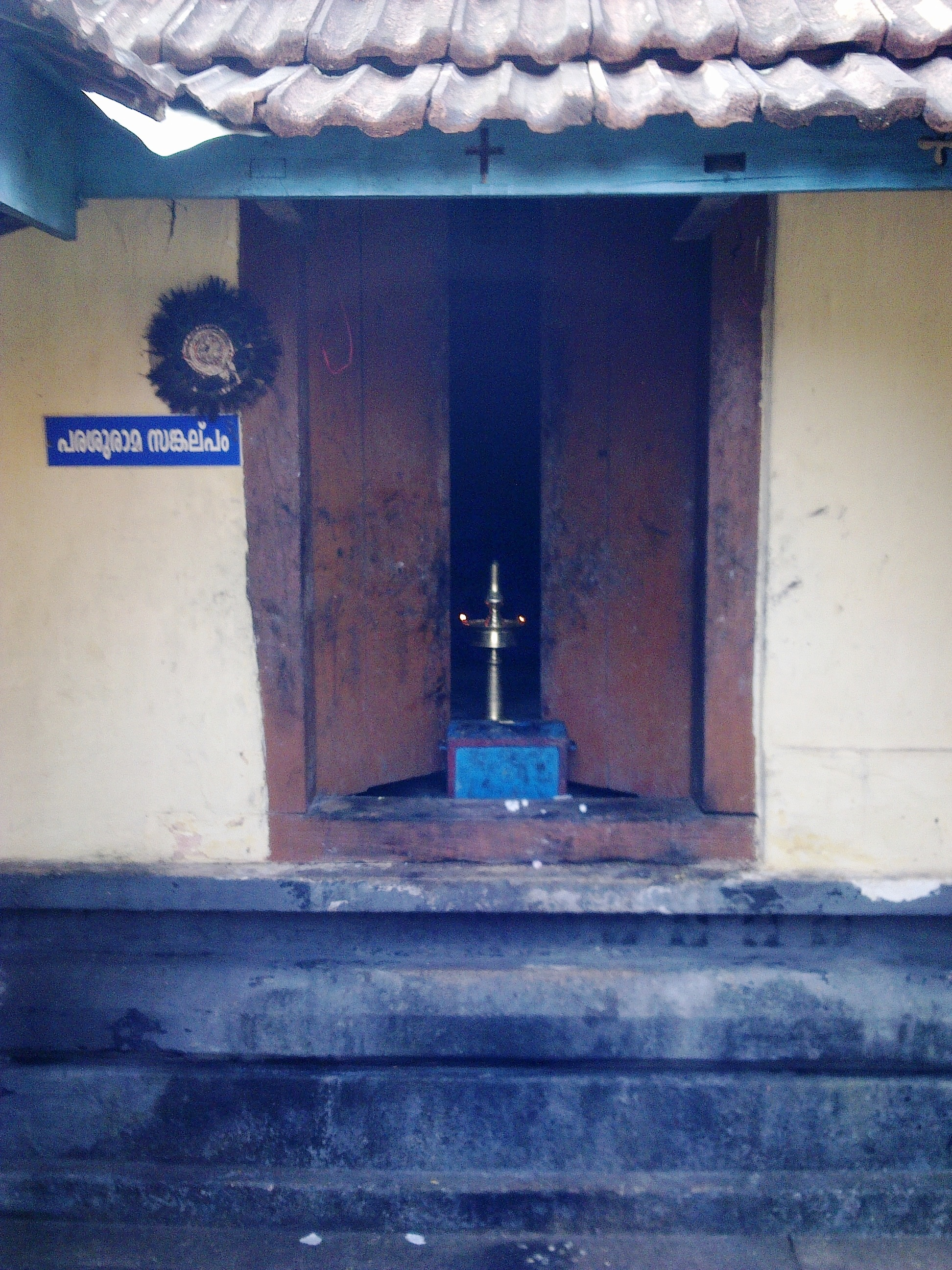 വാഴപ്പള്ളി-പരശുരാമ സങ്കല്പം